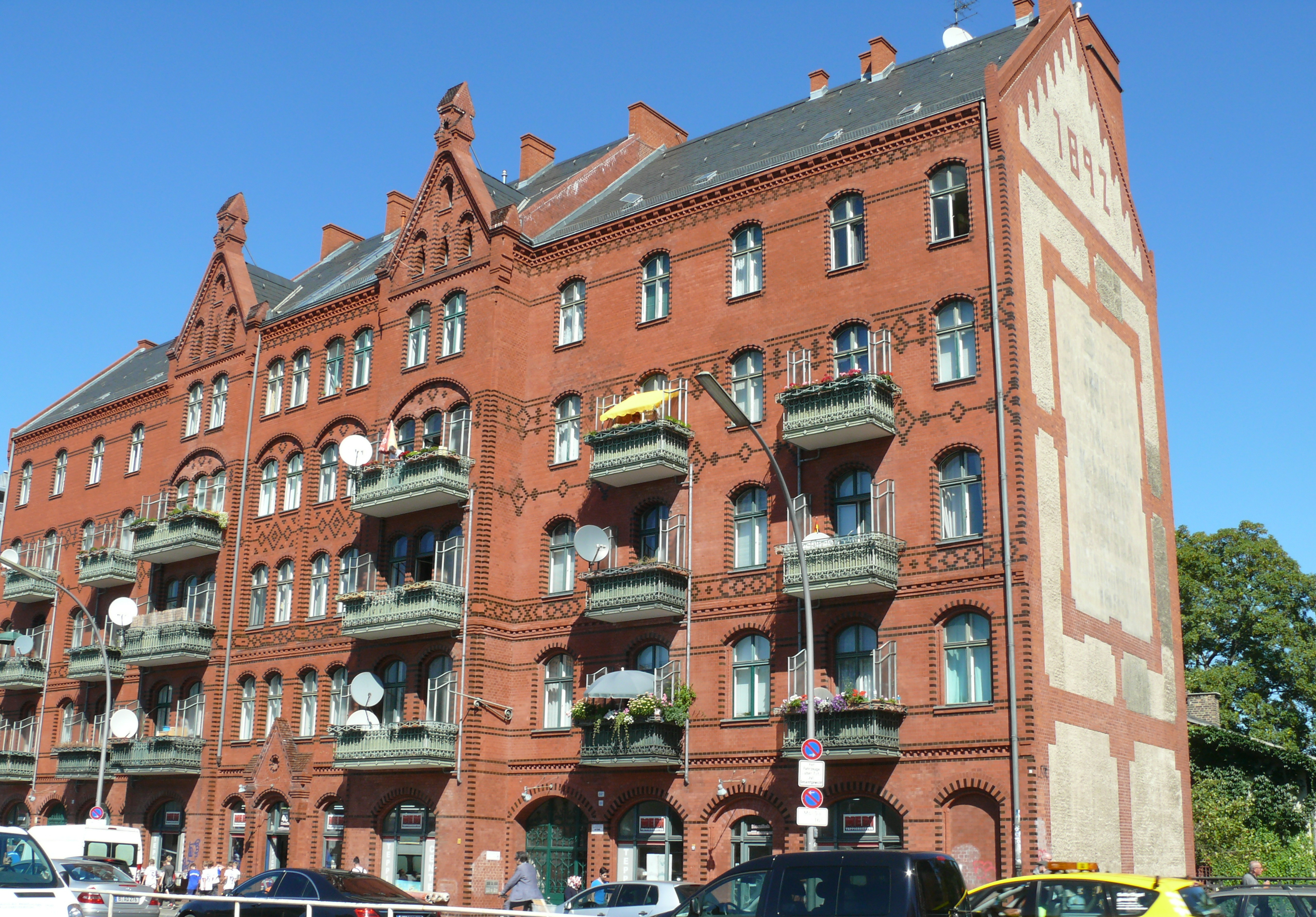 Berlin-Gesundbrunnen Badstraße 40 Mietshaus Arnheim